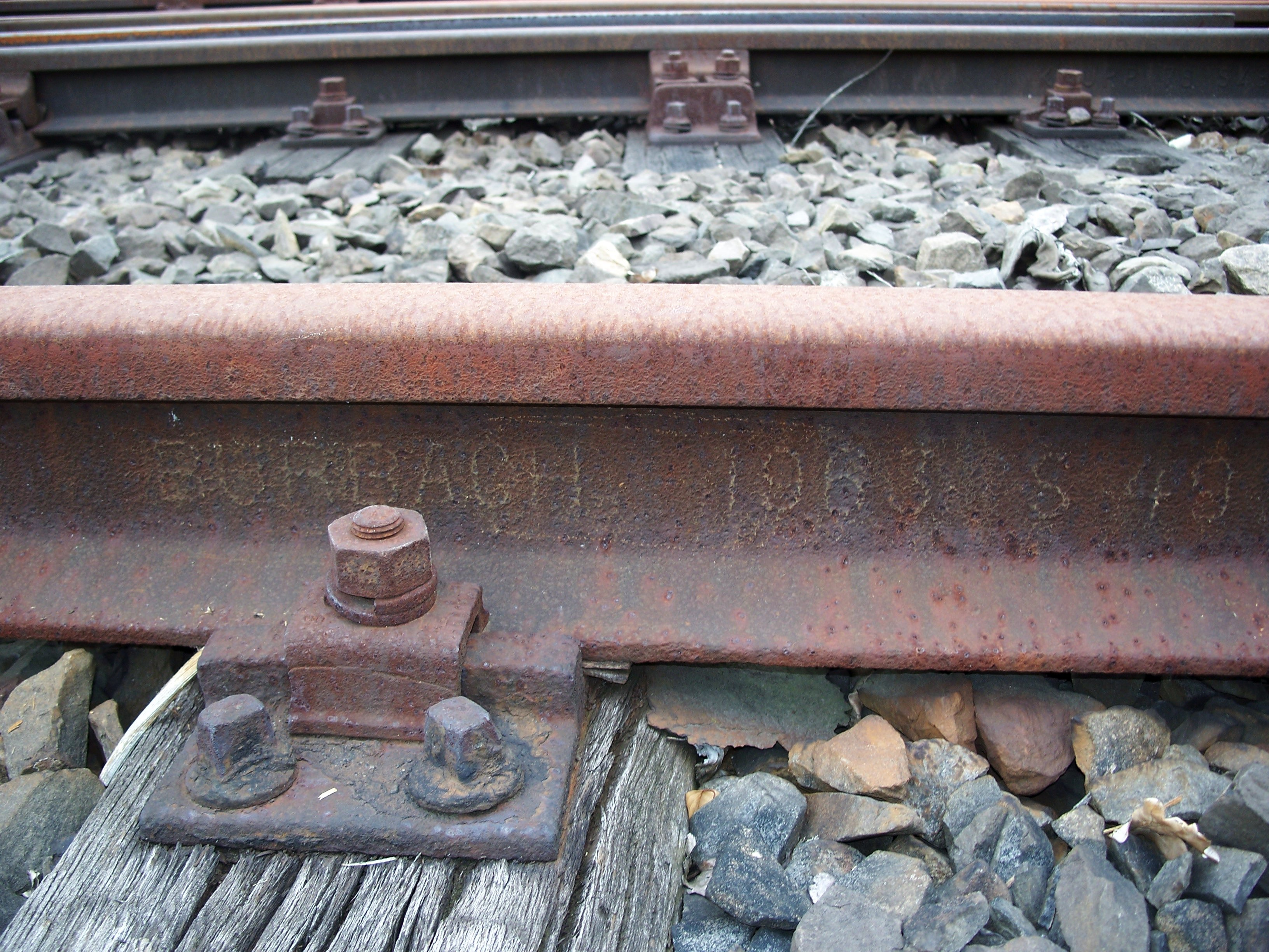 Walzzeichen "BURBACH 1963 S49" der Vereinigten Hüttenwerke Burbach-Eich-Düdelingen, Saarbrücken, auf einem Gleis am Bahnhof Wattenscheid.